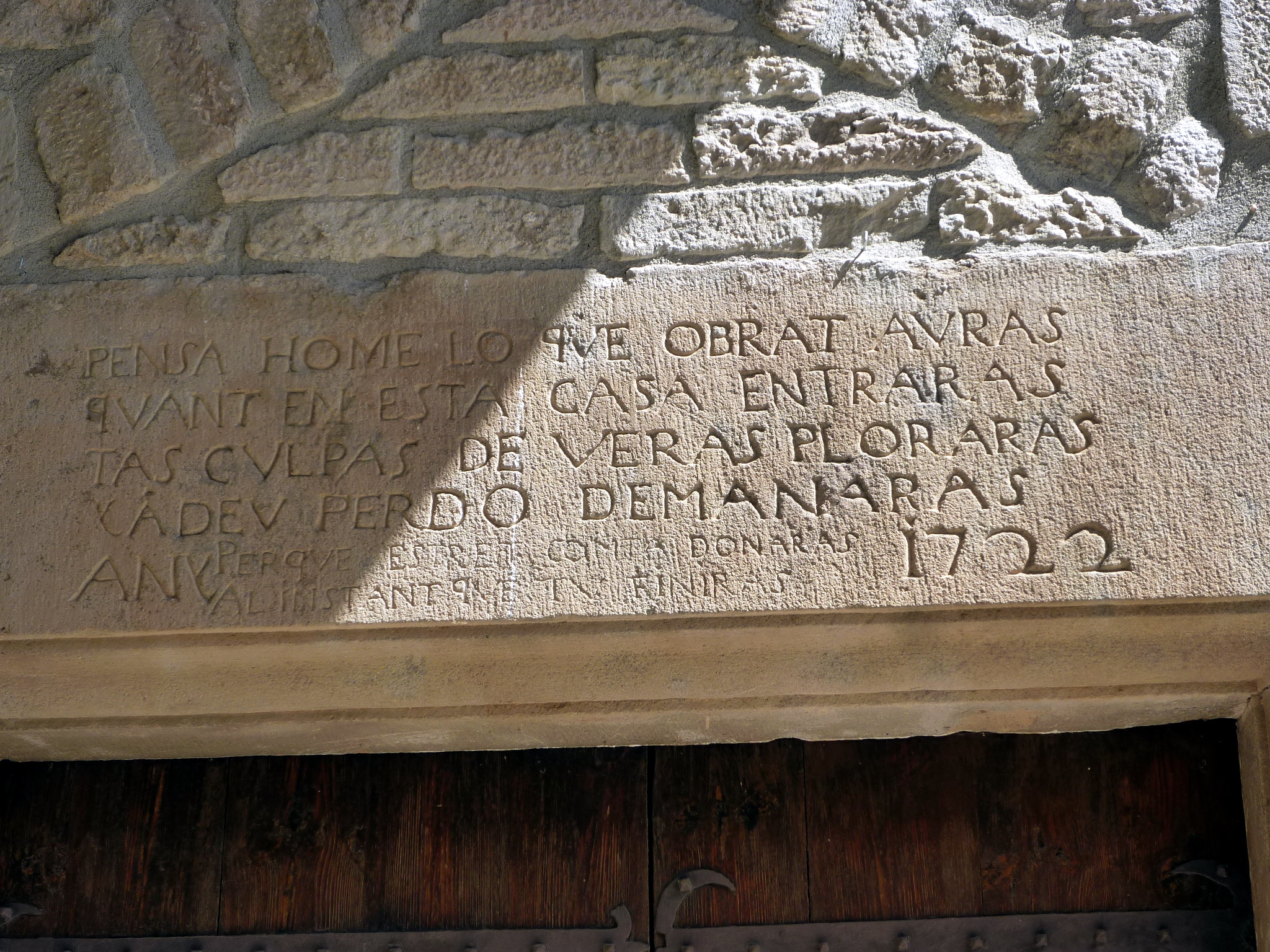 Sant Miquel de Pinell (Pinell de Solsonès): llinda del portal amb la inscripció "Pensa home lo que obrat auras - quant en esta casa entraras - tas culpas de veras ploraras - i a Deu perdo demanaras - Perque estret comta donaras - al instant que tu finiras - ANY 1722"